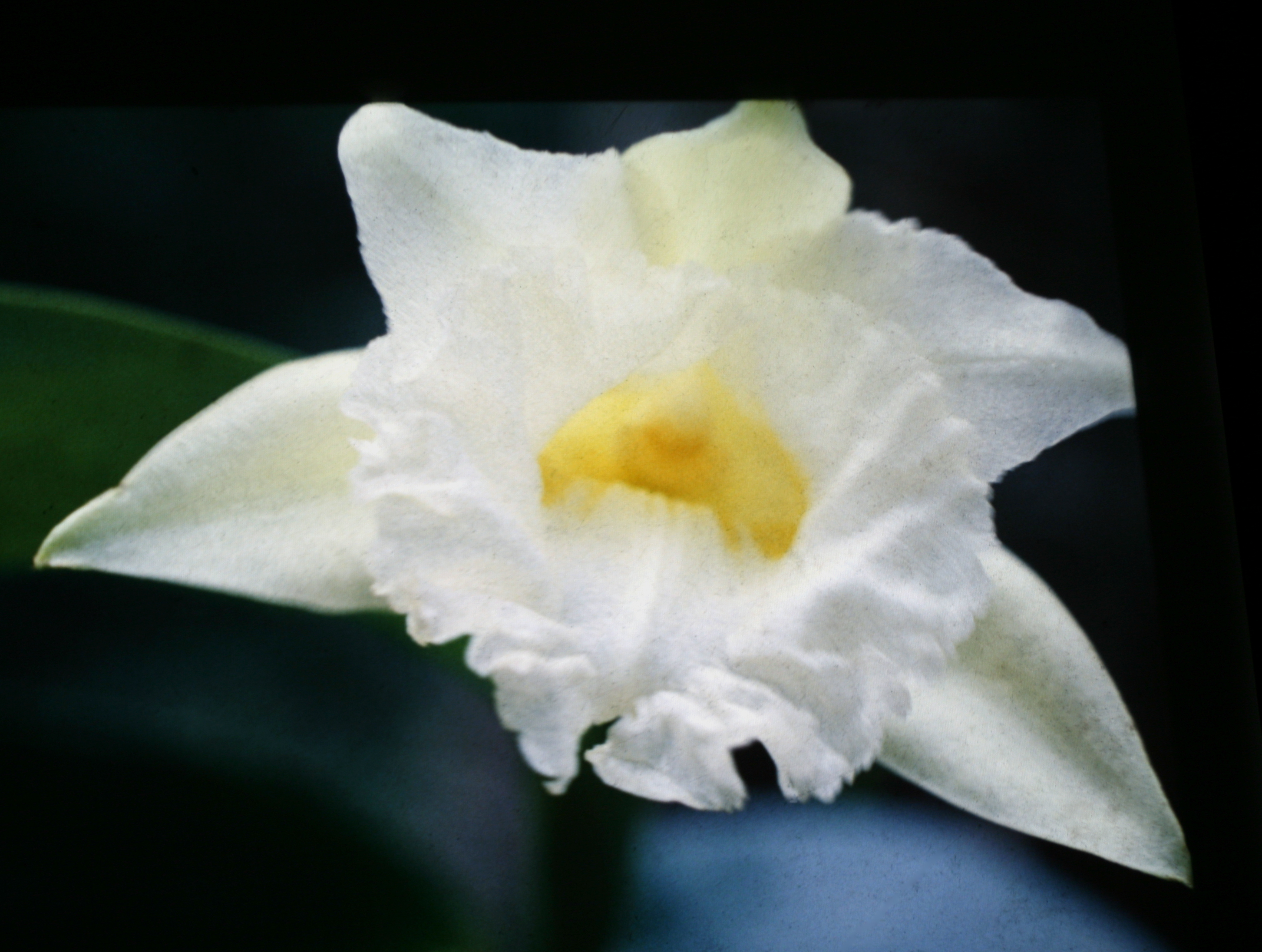 Sobralia macrophylla, Suriname.